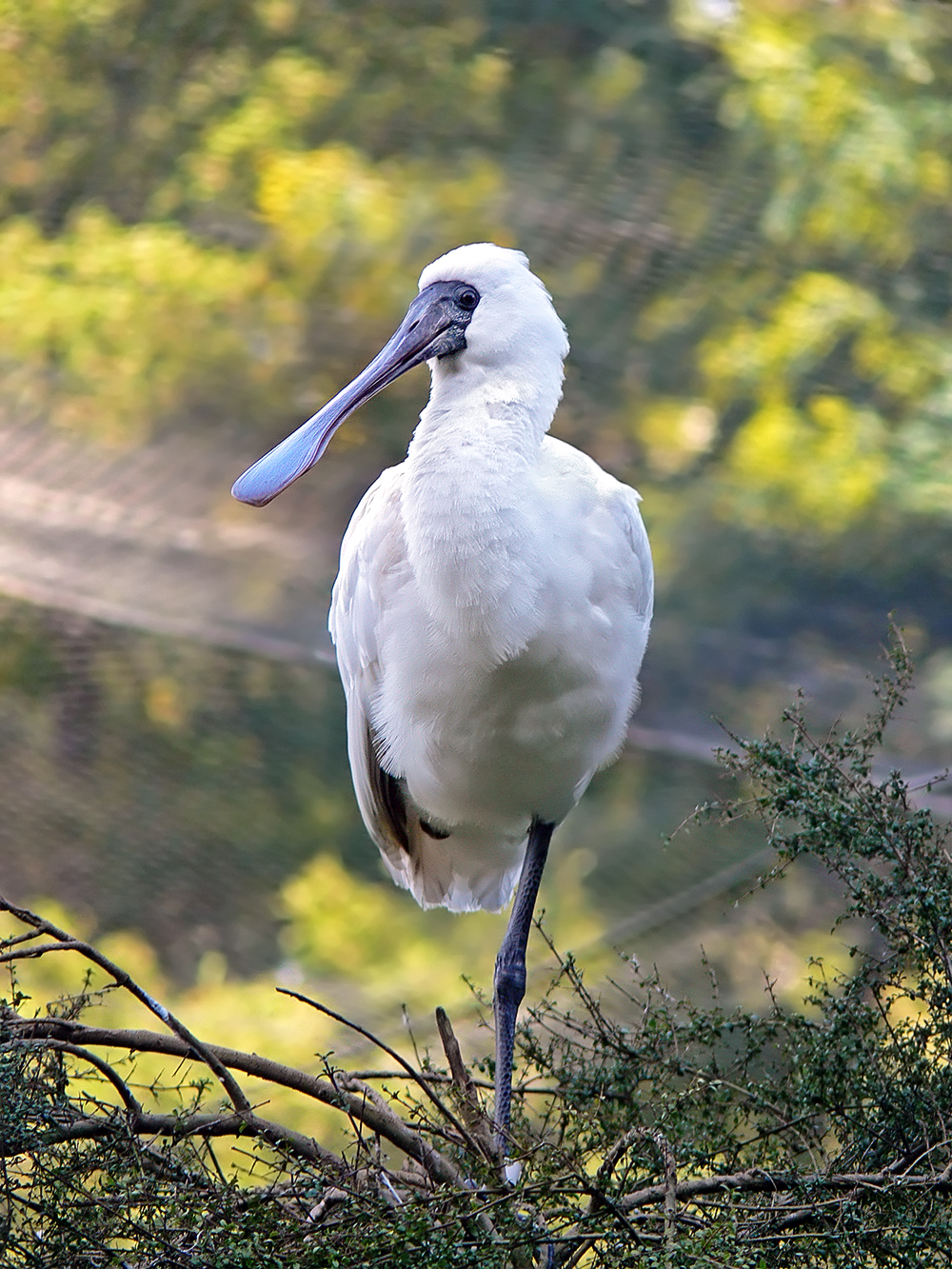 Royal spoonbill, Platalea regia